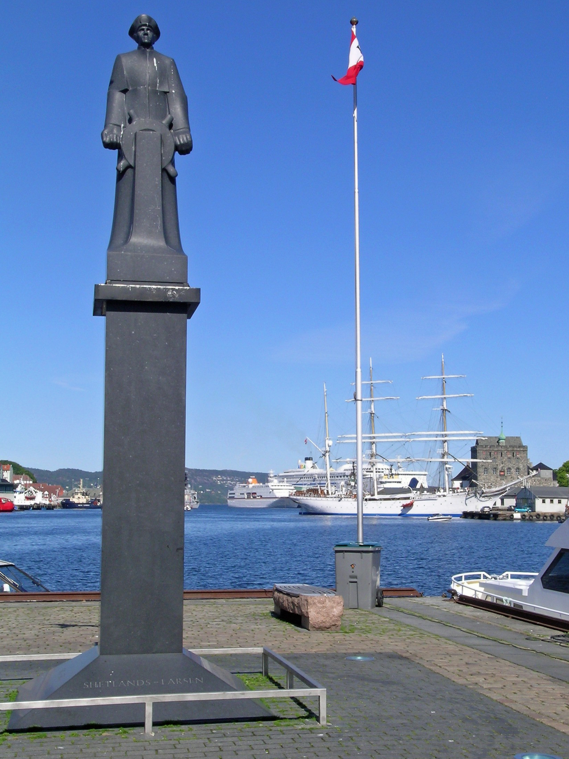 Statue von Leif Larsen "Shetlands-Larsen" im Hafen von Bergen (Norwegen)